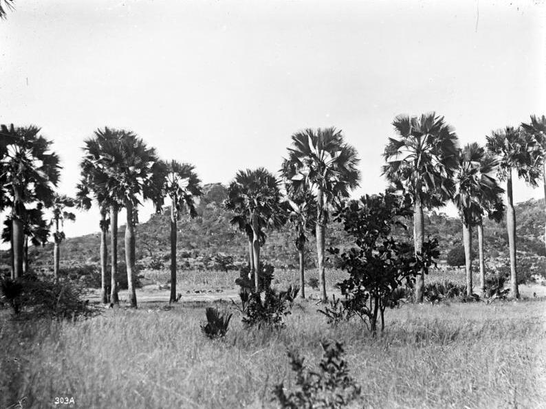 Landschaft mit Borassuspalmen